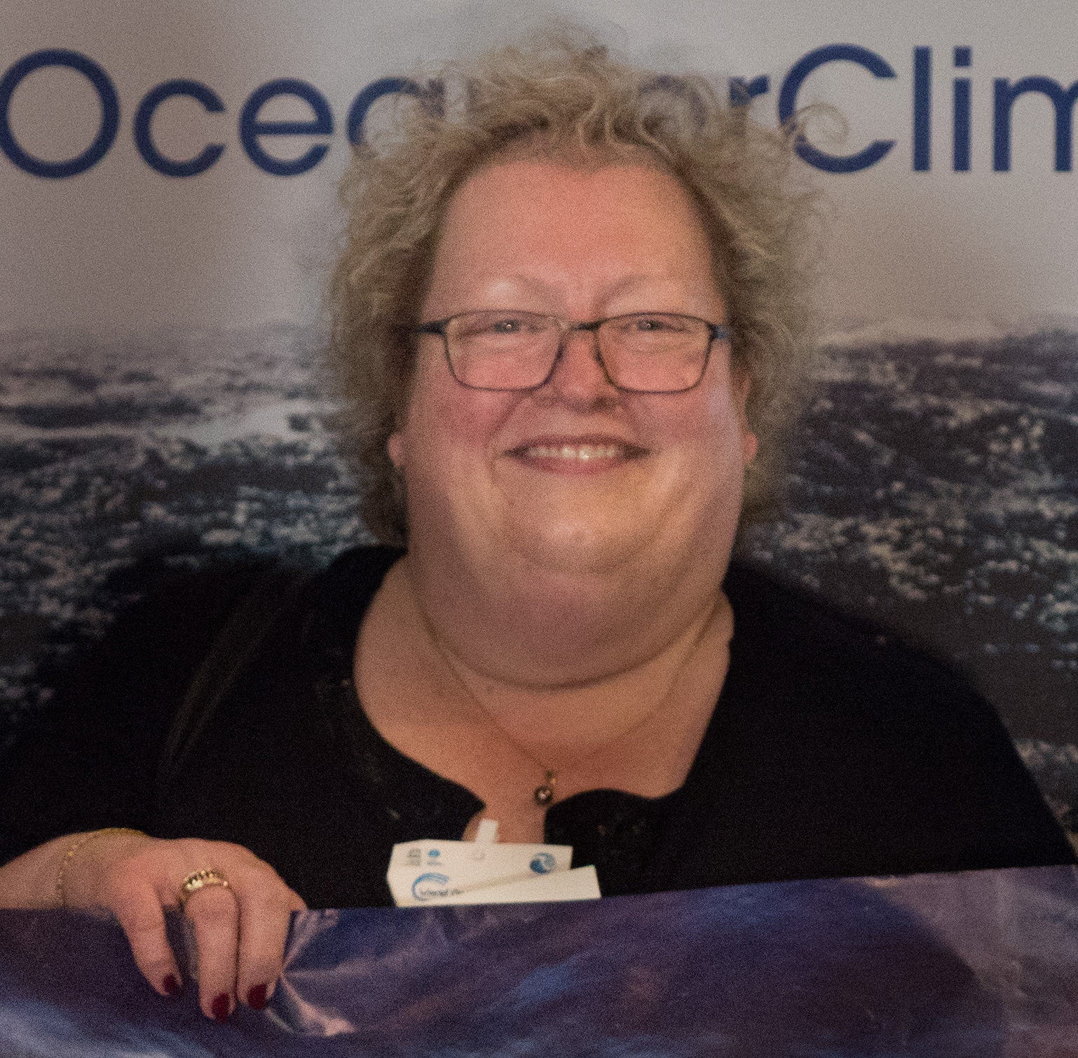 Karine Claireaux (sénatrice de Saint-Pierre-et-Miquelon) en juin 2015 lors du lancement de l'Appel de l'Océan pour le climat à l'occasion de la journée mondiale des océans, UNESCO